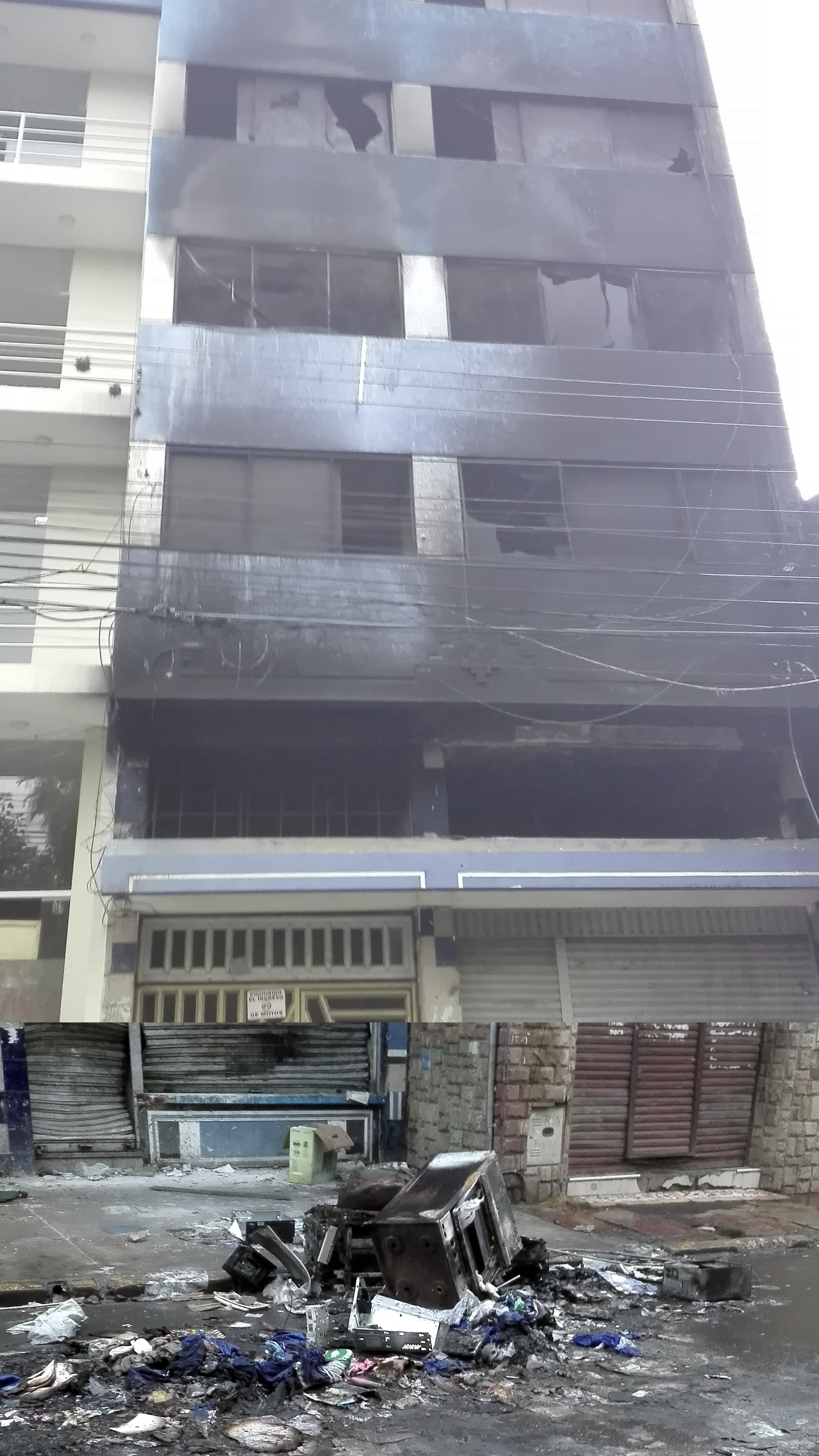 Edificio de la coordinadora de las seis federaciones del tropico de Cochabamba después del incendio. Fotografia realizada el 10 de noviembre de 2019.